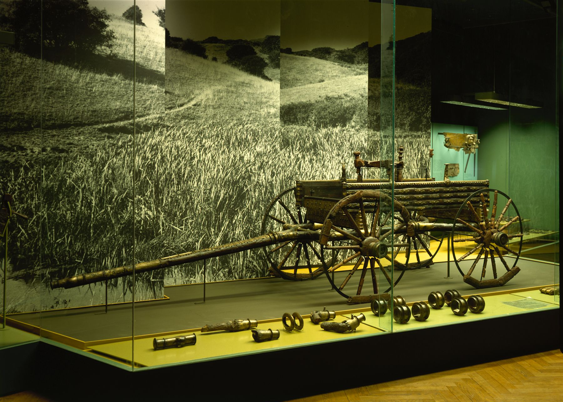 Vogn fra Dejbjerg. Træ og bronze. Dejbjerg, Ringkøbing Amt. Votiv/depotfund fra mose. Førromerk jernalder. (Foto i rum 11 efter nyopstillingen)